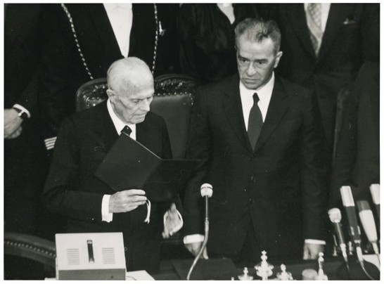 Giuramento e messaggio del Presidente della Repubblica Sandro Pertini